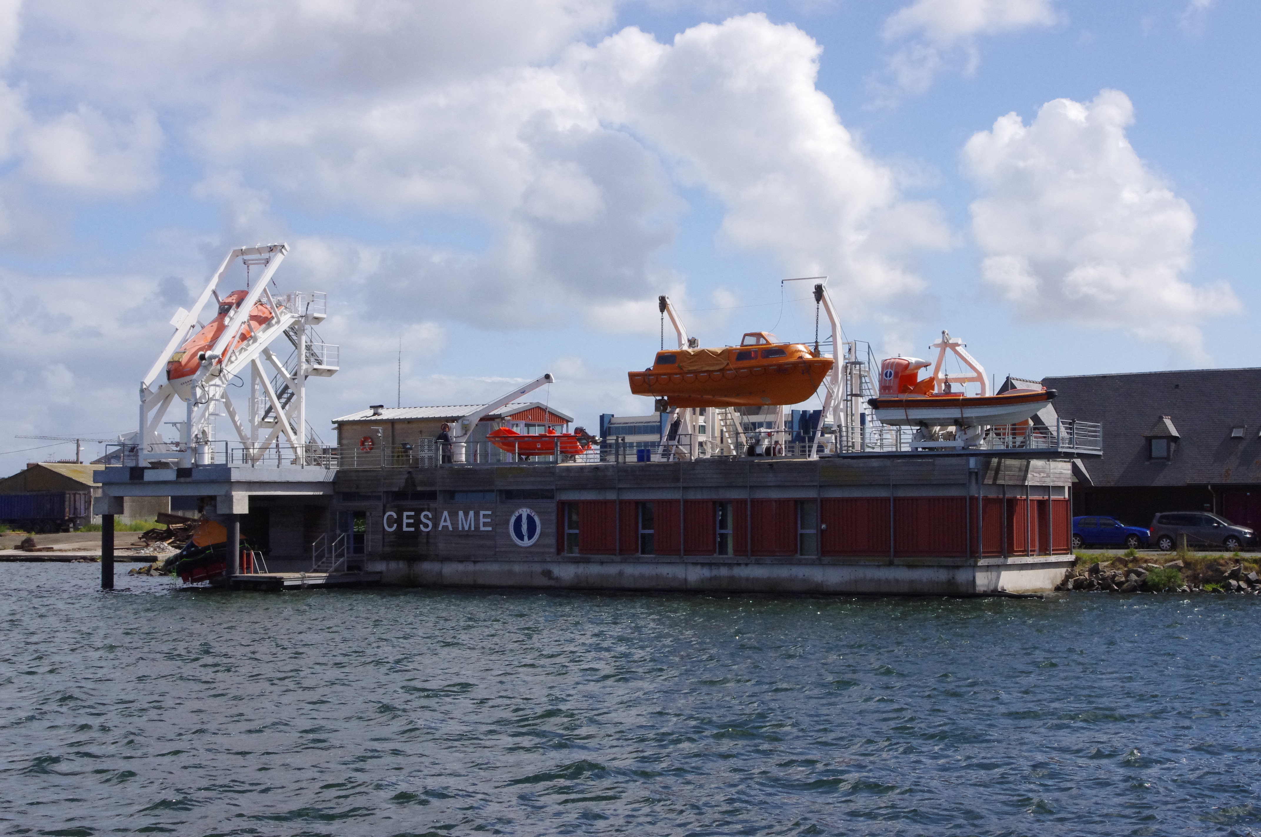 Centre d Entraînement à la Survie et au sAuvetage en MEr (CESAME). Centre lié à l'école nationale supérieure maritime (ENSM) sur le site de Saint-Malo.